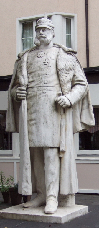 Harro Magnussen: Standbild Kaiser Wilhelm I. (1906) – Bonn, Kaiserplatz